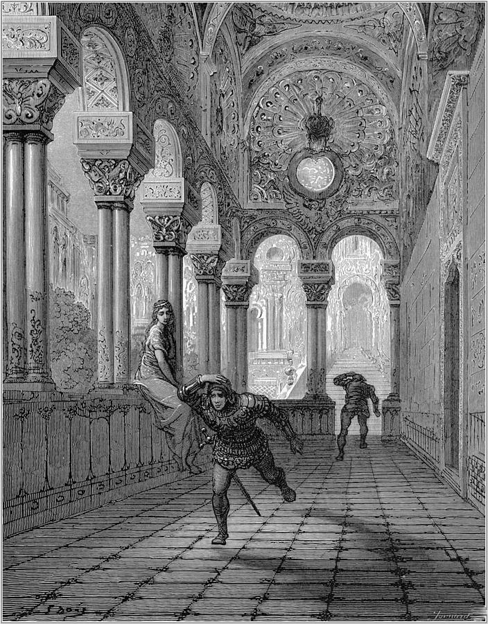 illustration of Ludovico Ariosto’s “Orlando Furioso”.